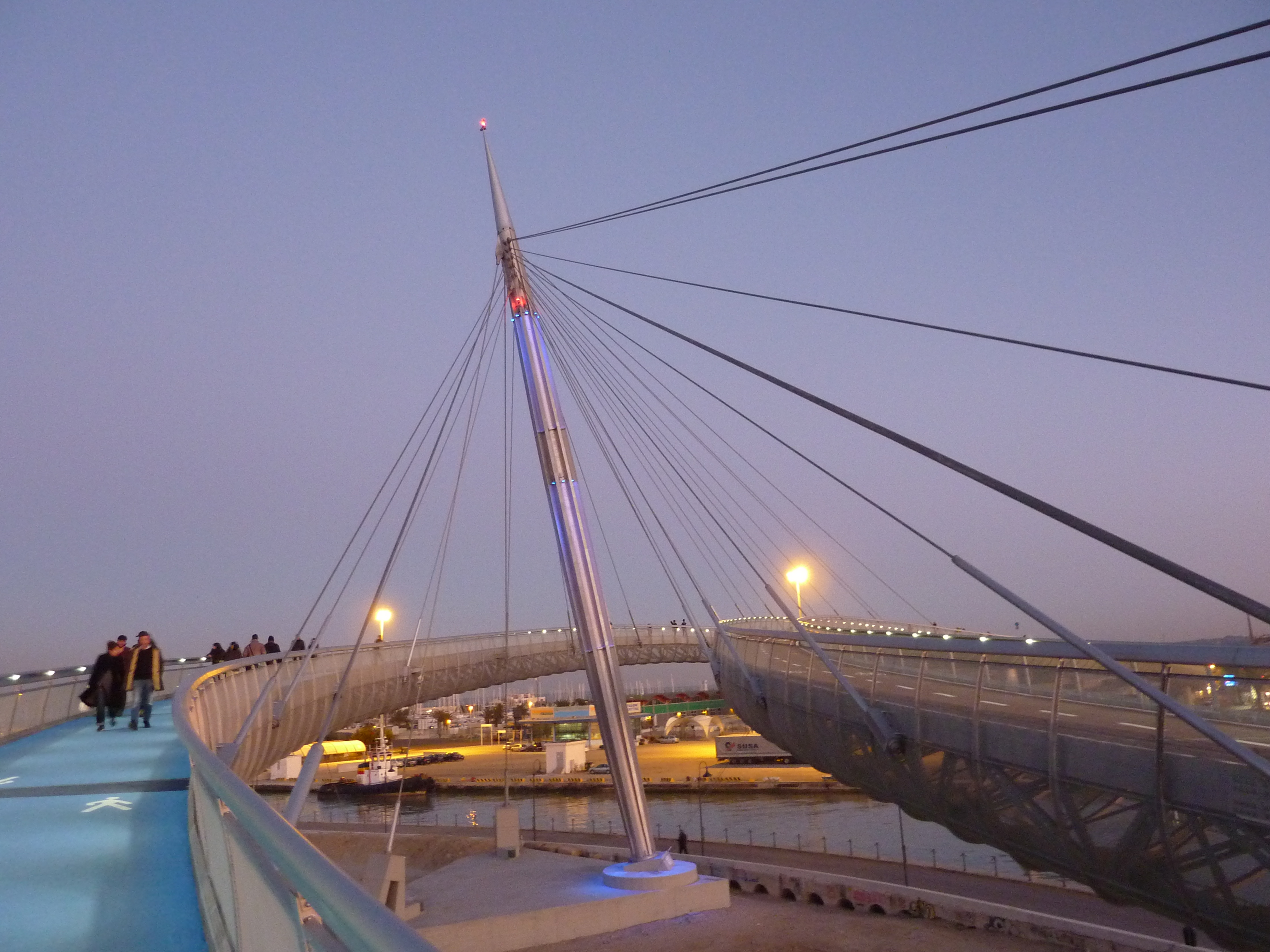 "Ponte del mare" - cable-stayed bridge in Pescara - Italy